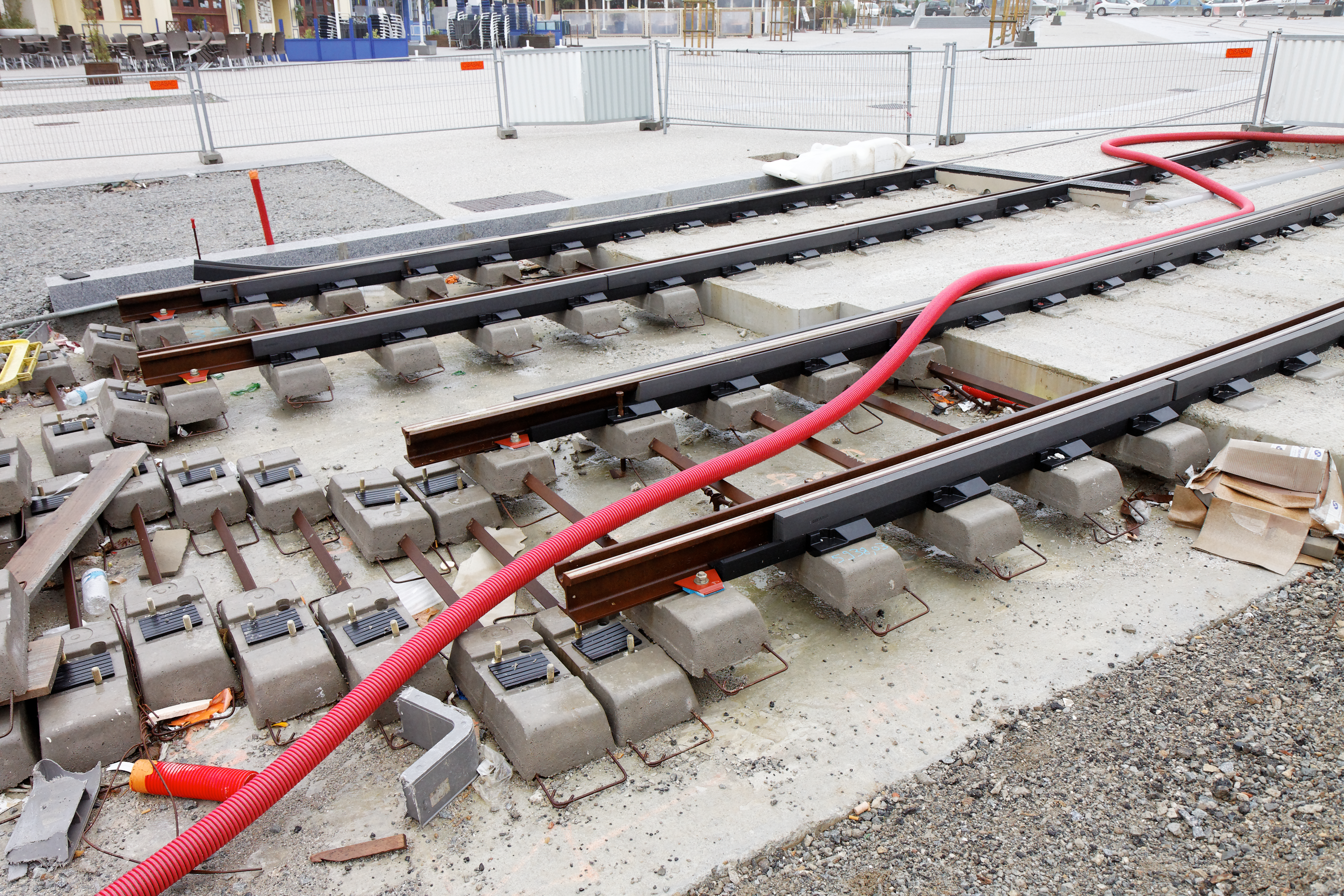 Travaux d'aménagement dans la rue de Siam pour l'arrivée du Tramway dans la ville en 2012.